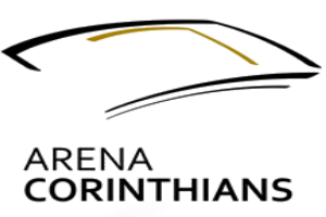 Logo da Arena Corinthians